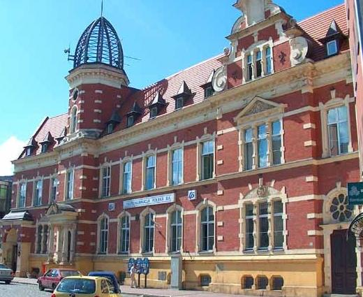 były gmach poczty głównej w Gorzowie (zabytek nr rejestr. L-69)